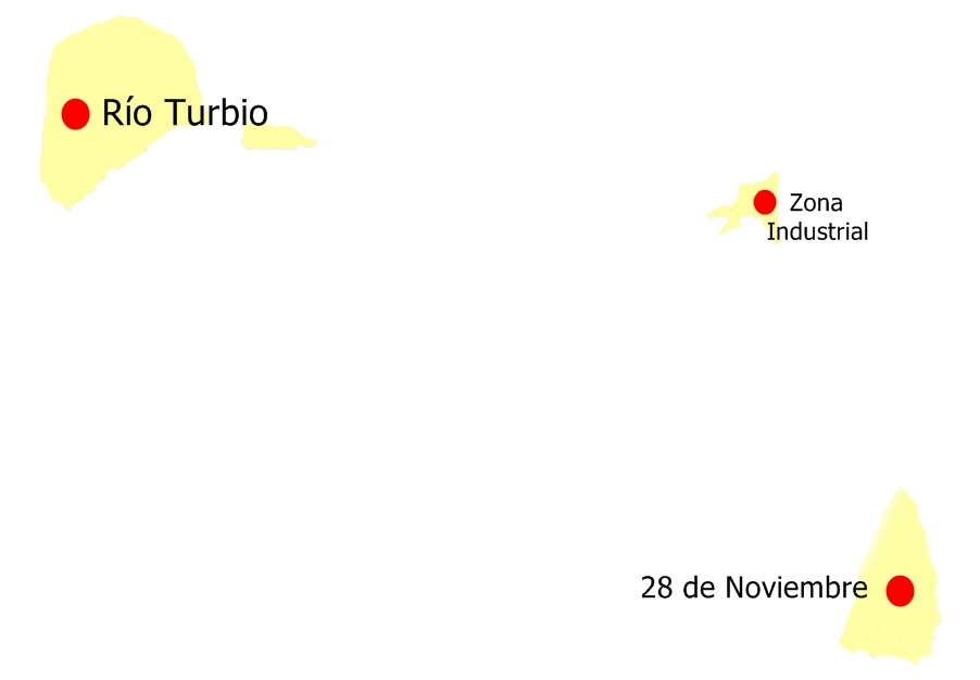 Mapa que realizé de Rió Turbio - 28 de Nov.